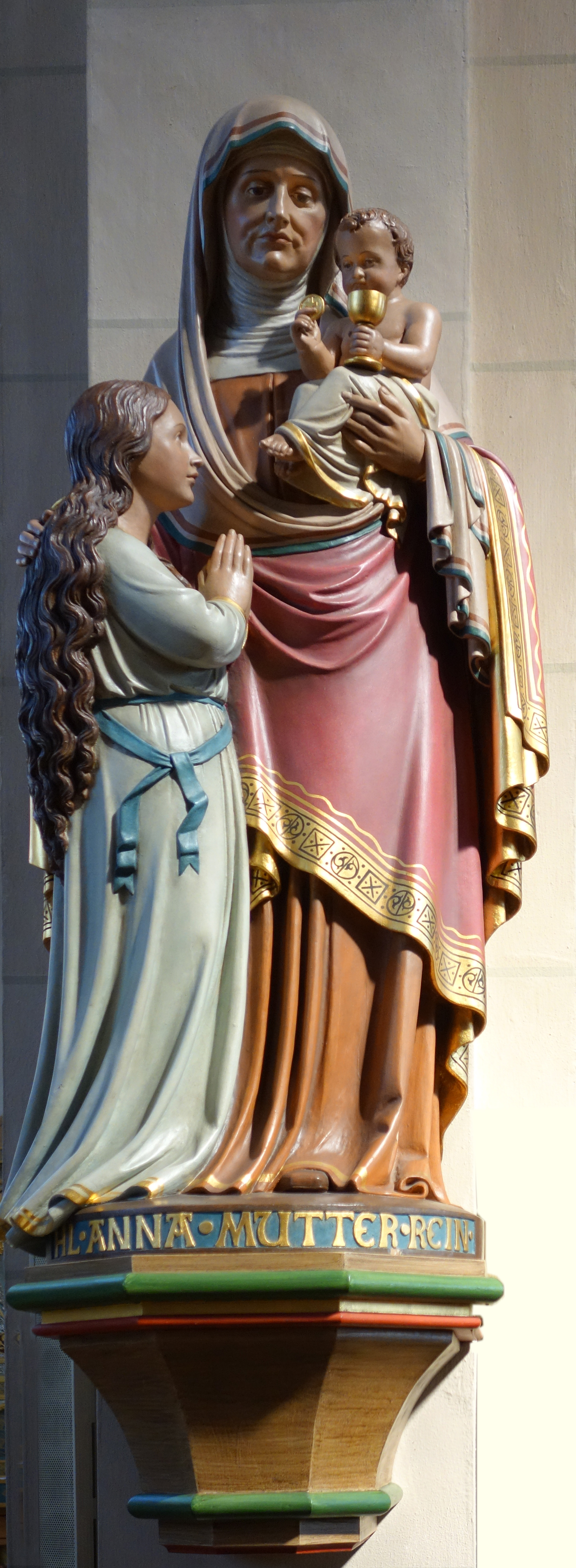 Pfarrkirche St. Maria-St. Vicelin, Neumünster, Heiligenfigur Anna selbdritt